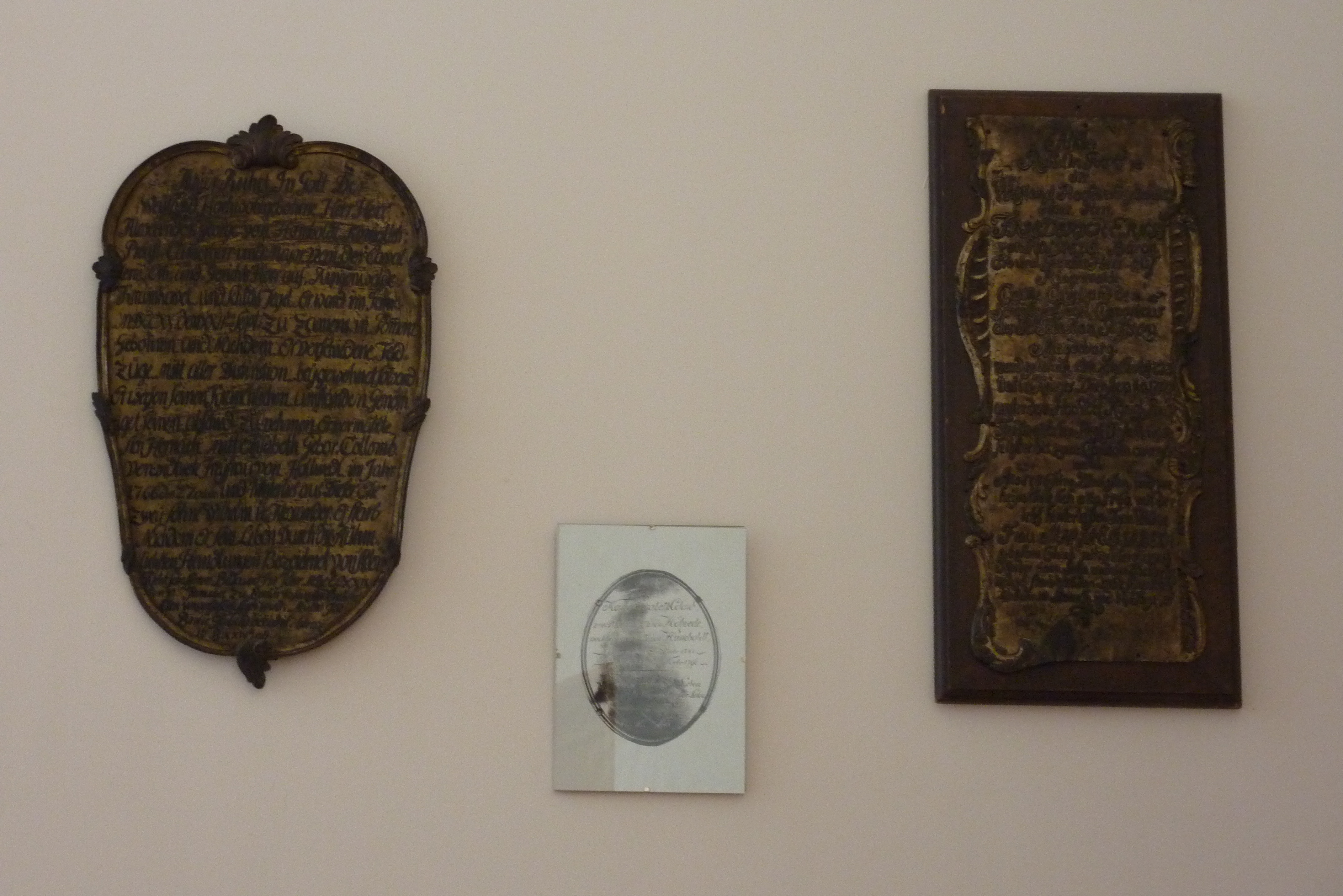 Fotografie von der Sargtafel der Marie Elisabeth von Humboldt (1741–1796, Bildmitte) zwischen den Sargtafeln ihres ersten Gatten Friedrich Ernst von Holwede (1723–1765, rechts) und ihres zweiten Gatten Alexander Georg von Humboldt (1720–1779, links), ausgestellt in der Kirche Berlin-Wartenberg in Berlin-Neu-Hohenschönhausen.